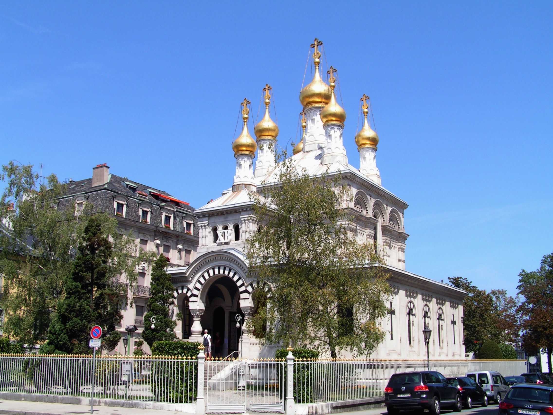 Rue Toepffer 9, Genève. Église orthodoxe russe.